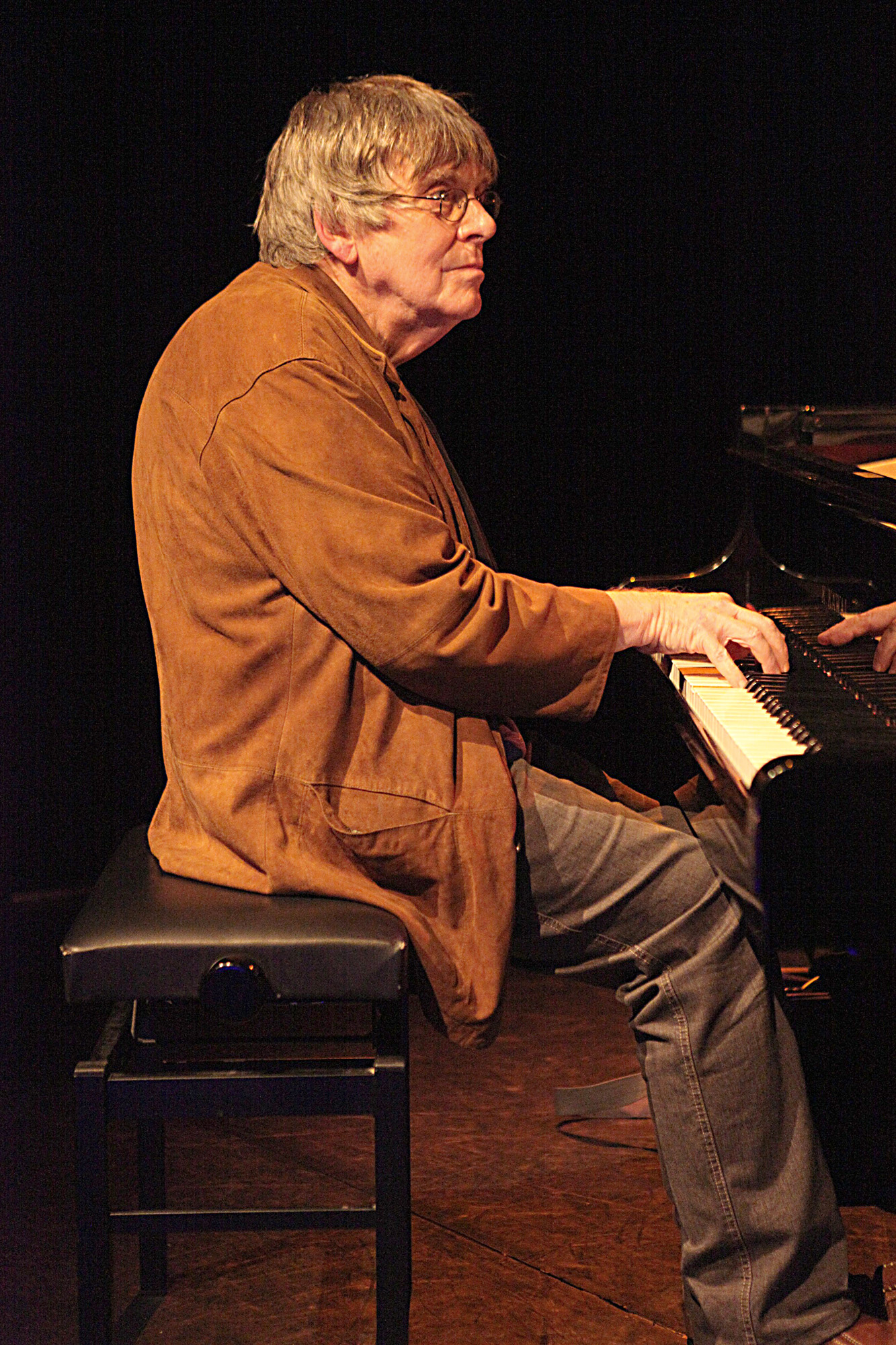 Rob van den Broeck